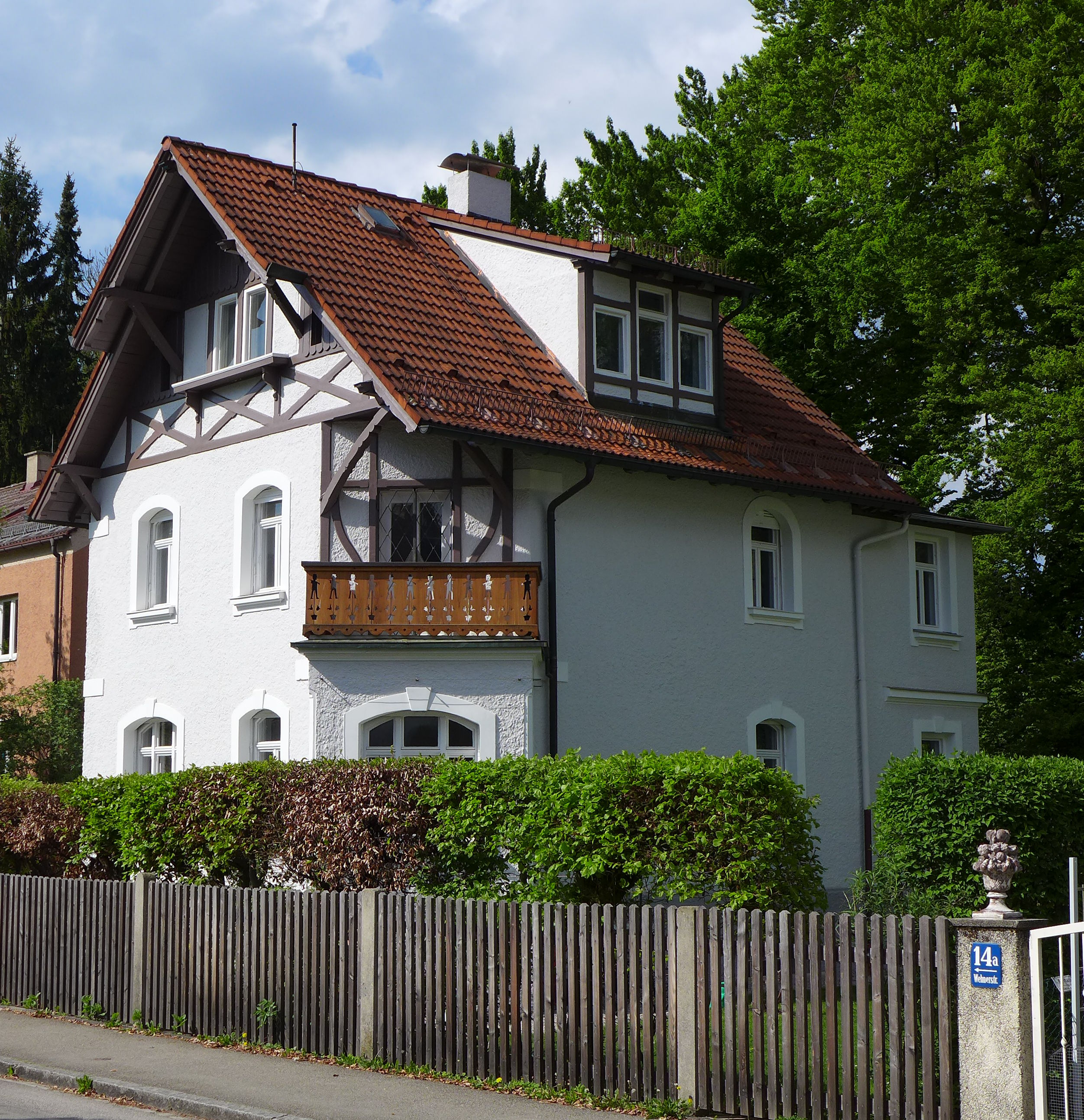 Wehnerstr. 16, München